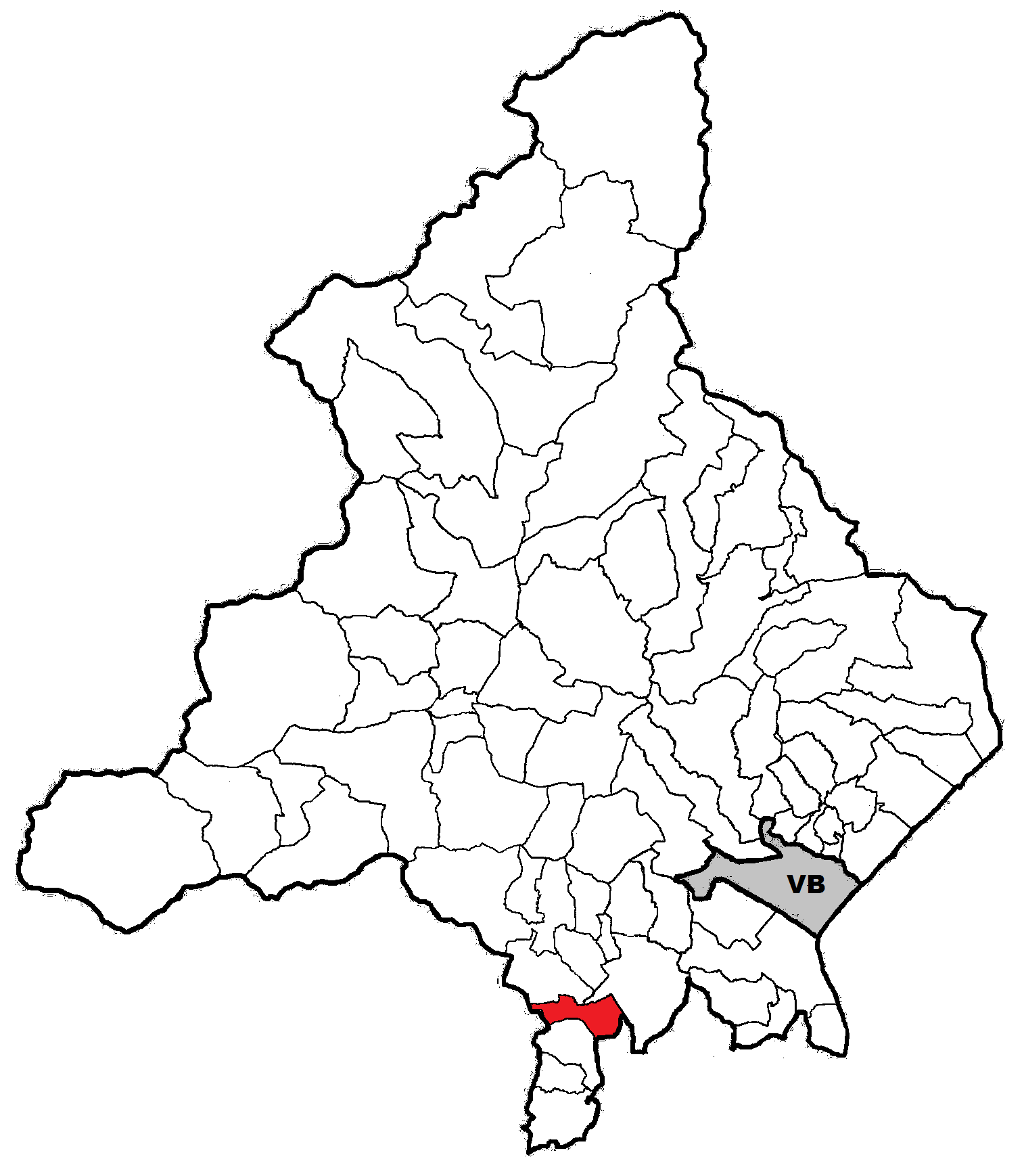 Posizione del comune nella provincia del Verbano Cusio Ossola (Verbania)